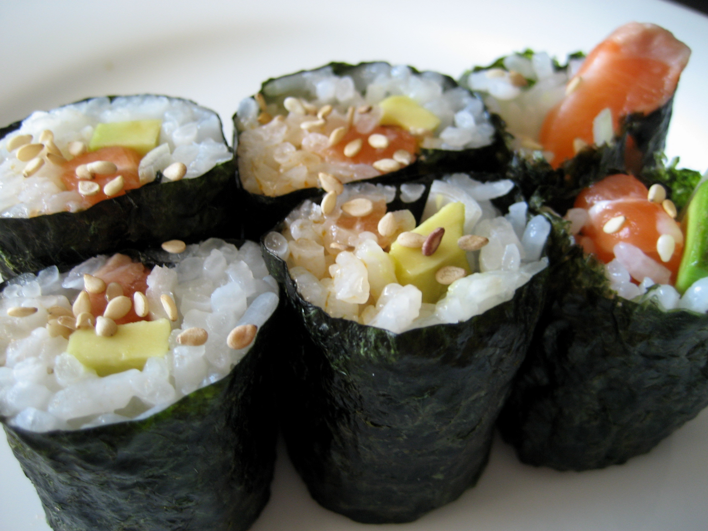 Salmon, avocado, scallion, chili oil, wasabi, and sesame seeds. Nom.